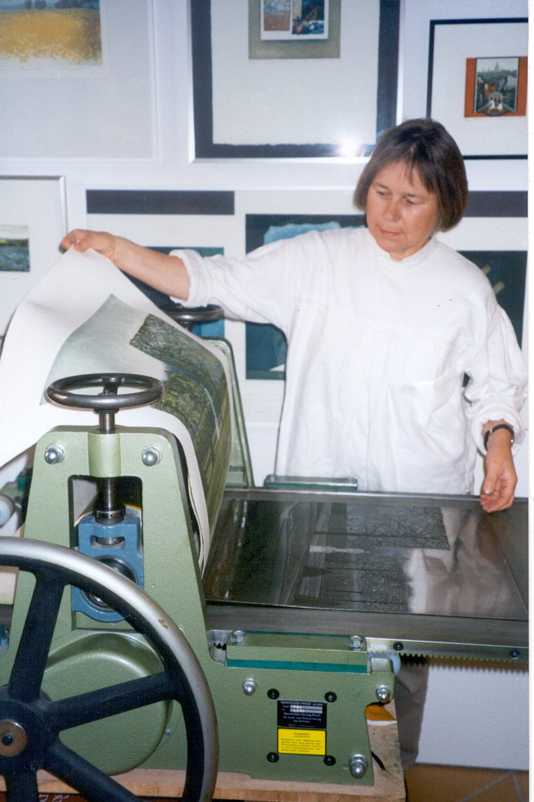 Porträt-Foto der Malerin Ilse Gottwald